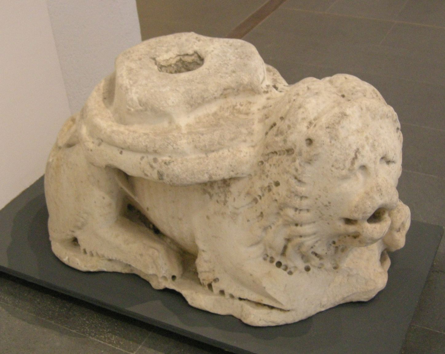 Museo regionale di messina, anonimo del XII-XIII sec., leone stiloforo